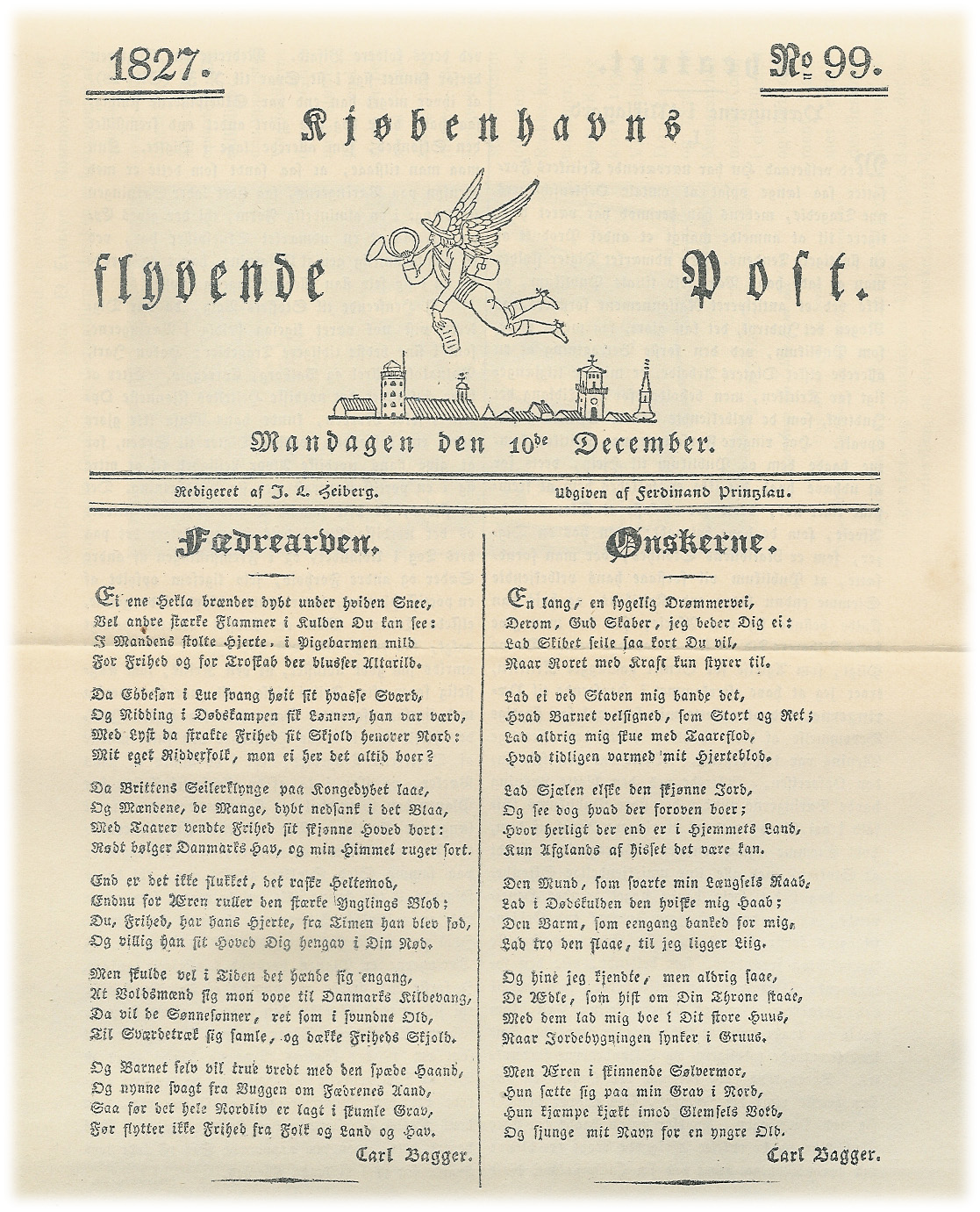 Johan Ludvig Heibergs "Kjøbenhavns flyvende Post". Her et nummer fra 1827 med digte af Carl Bagger på forsiden.